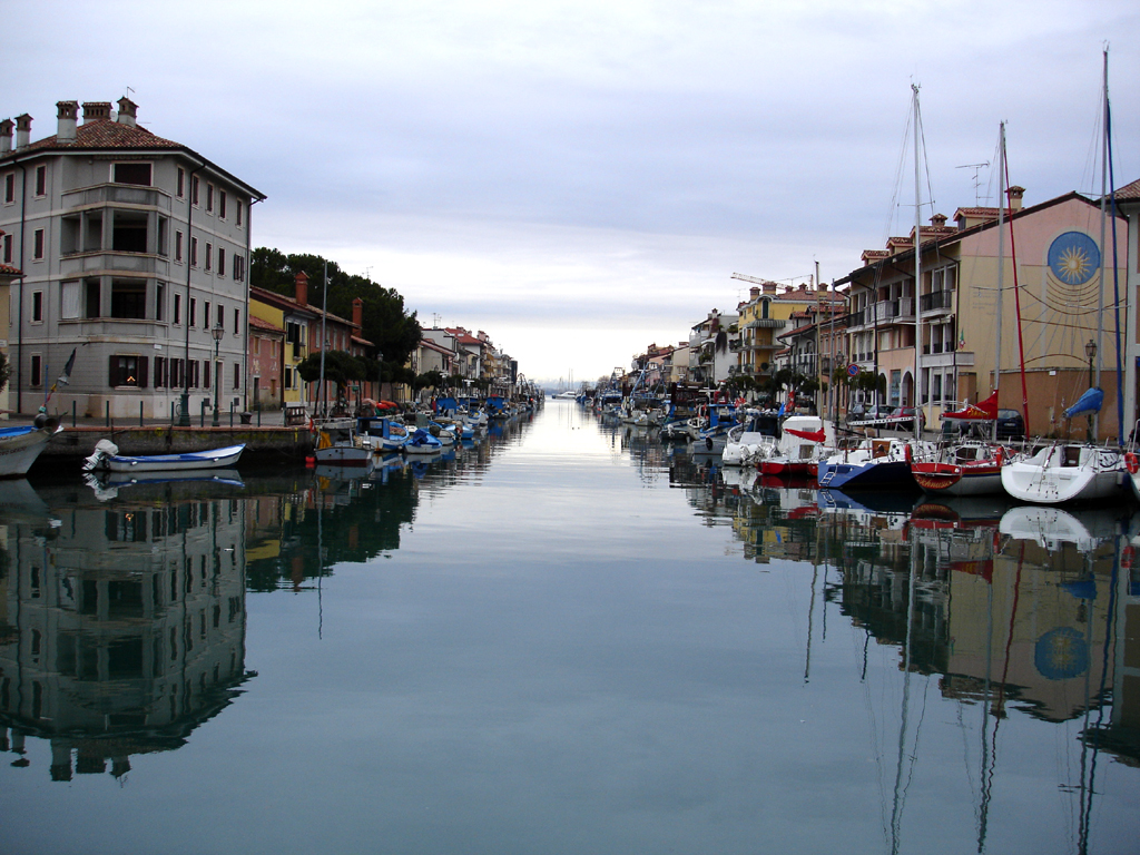 Grado, Friuli Venezia Giulia, ItaliaShipway